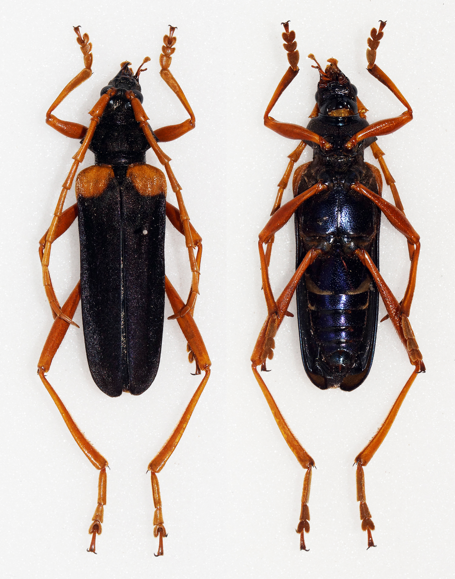 Schultze,1920 Sex: Male Data: 08-2014 - Sierra Madre - Quirino - Eastern Luzon - Philippines Size: 42.5mm